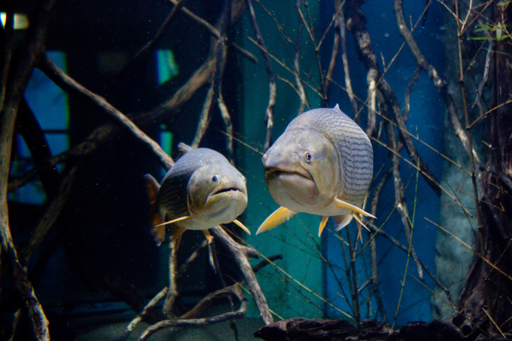 Dourado no Aquário de Belo Horizonte.